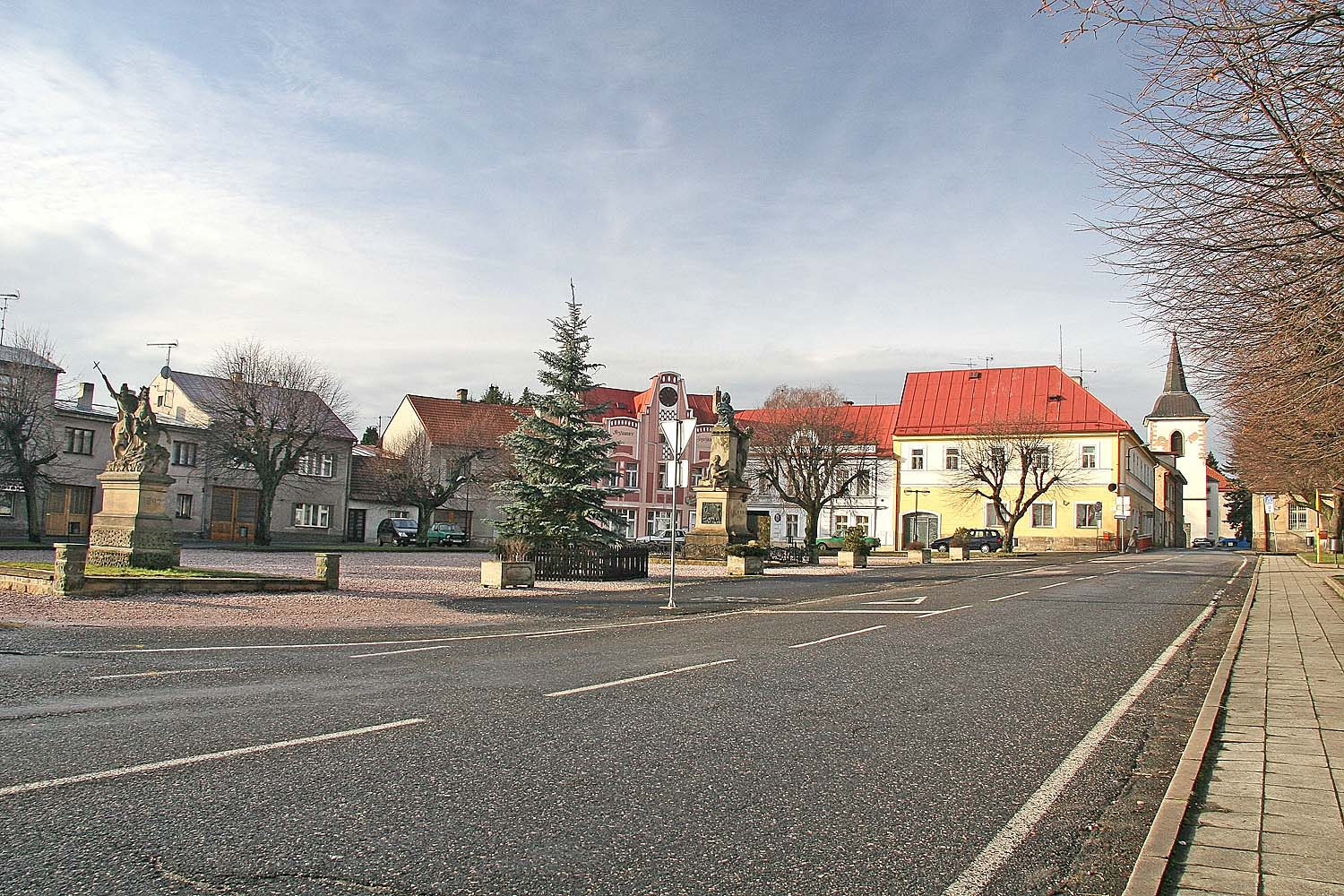 Česky: Miletín, náměstí K. J. Erbena.